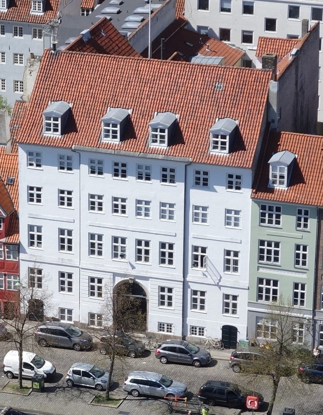 Overgaden neden Vandet 39 in Christianshavn, Copenhagen, Denmark